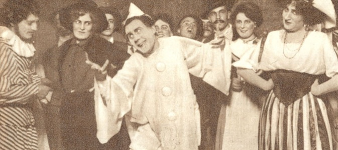 Вяйнё Сола в опере "Паяцы"